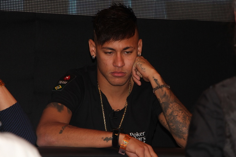 Neymar-006